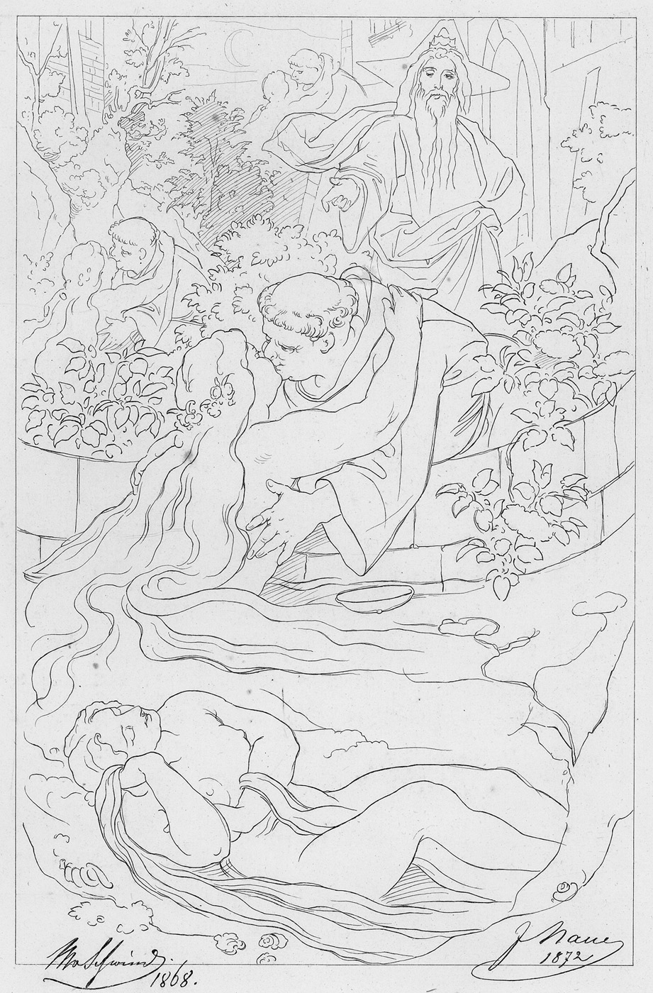 Illustration zu Mörikes Historie von der Schönen Lau